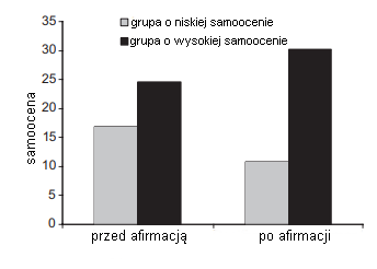 Wpływ afirmacji na osoby z niską oraz wysoką samooceną.